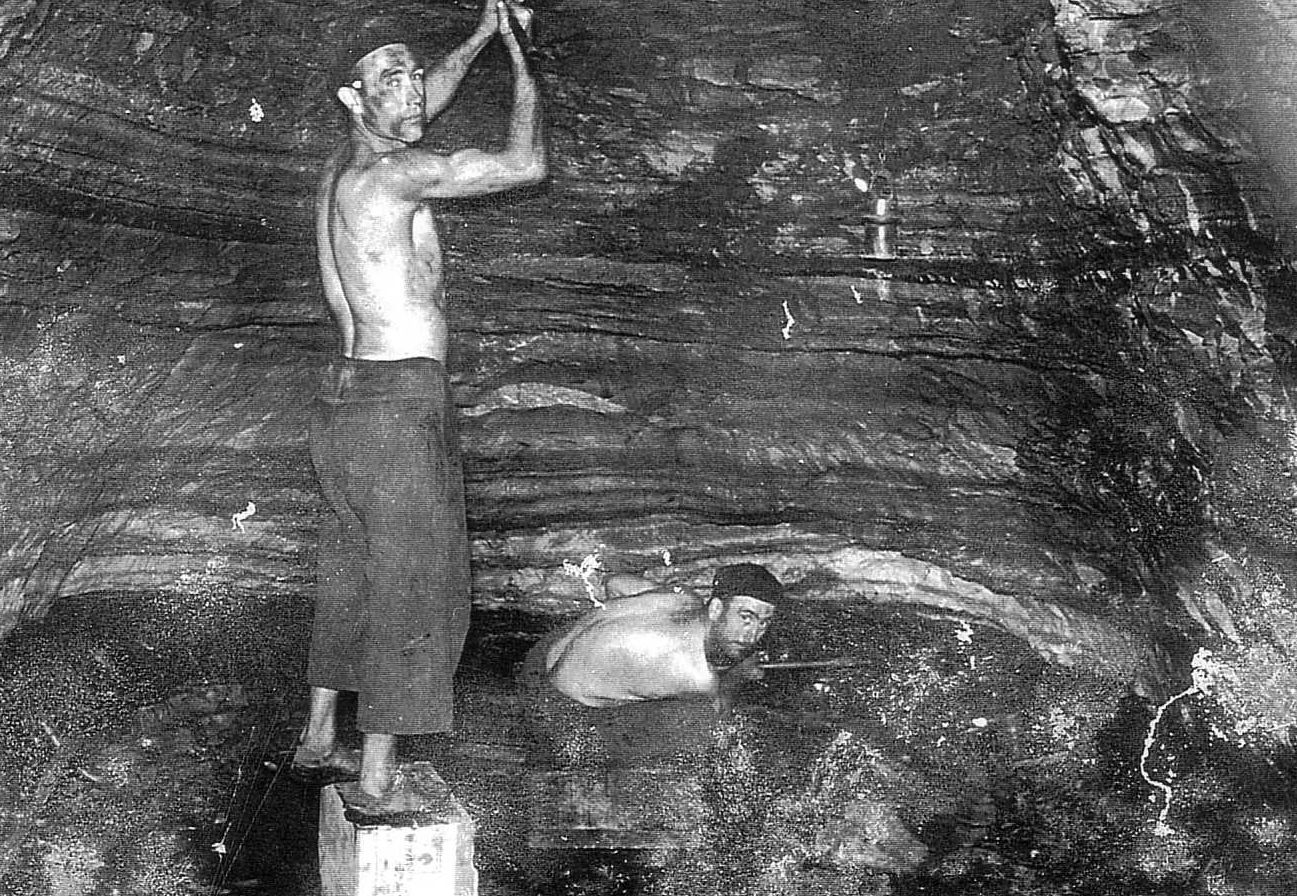 Mineiros traballando.